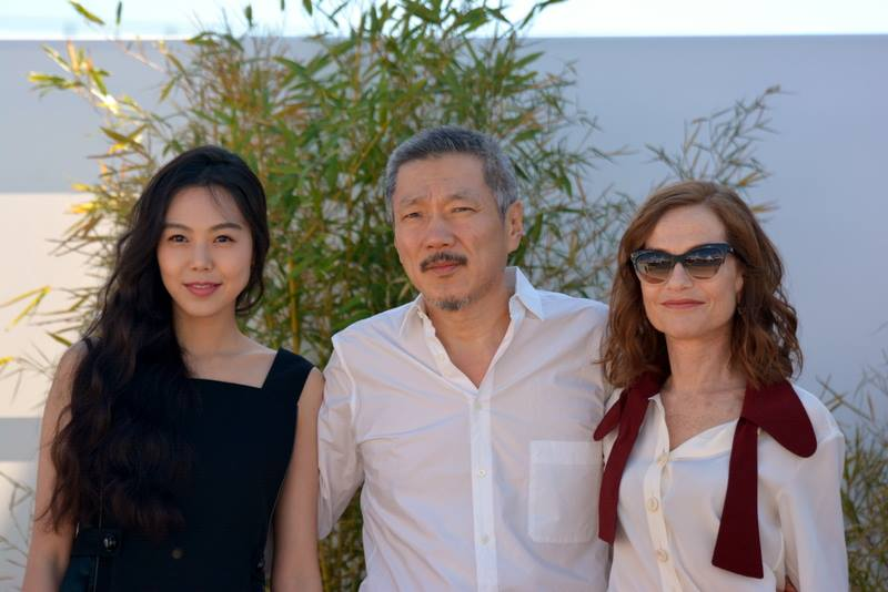 Kim Min-hee, Hong Sang-soo et Isabelle Huppert au festival de Cannes